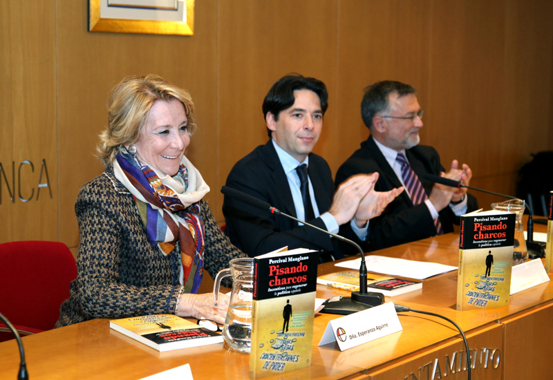 Esperanza Aguirre en la presentación de un libro de Percival Manglano